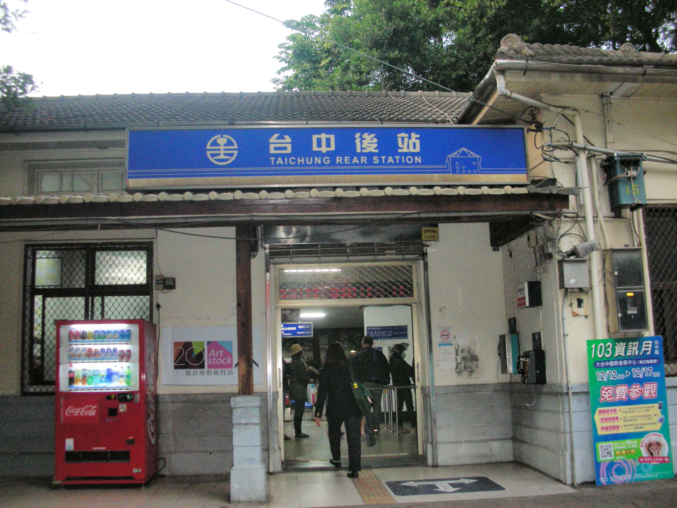 中文（台灣）: 臺灣鐵路管理局臺中車站後站。